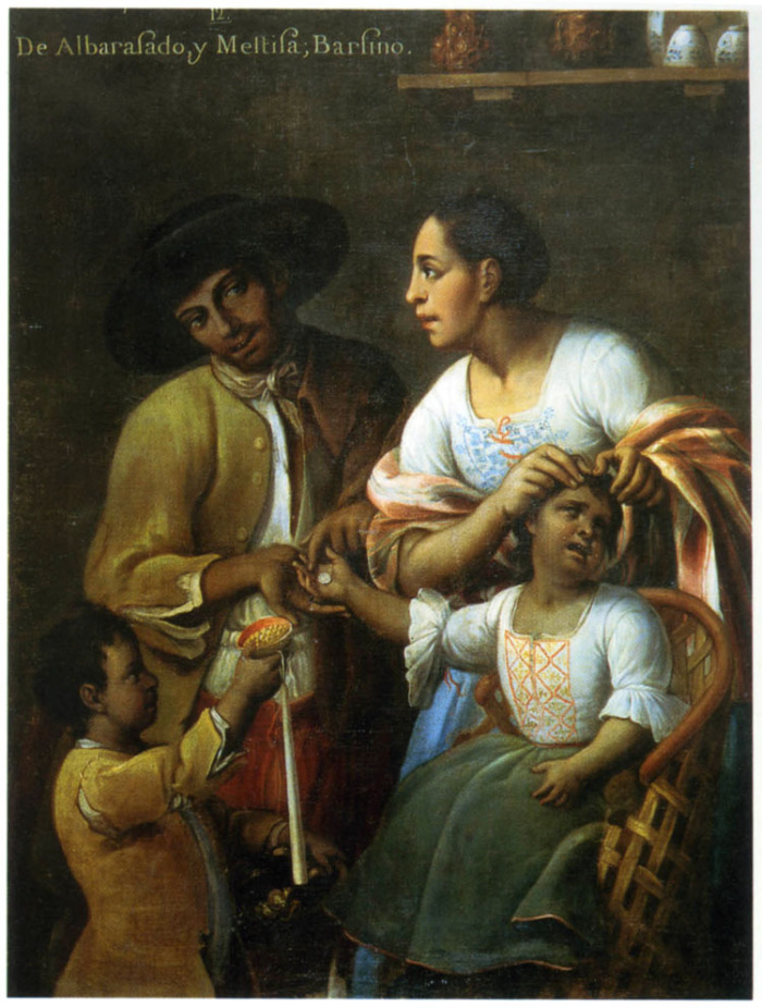 Pintura de Castas, 12. De albazarado y mestiza – Barcino.